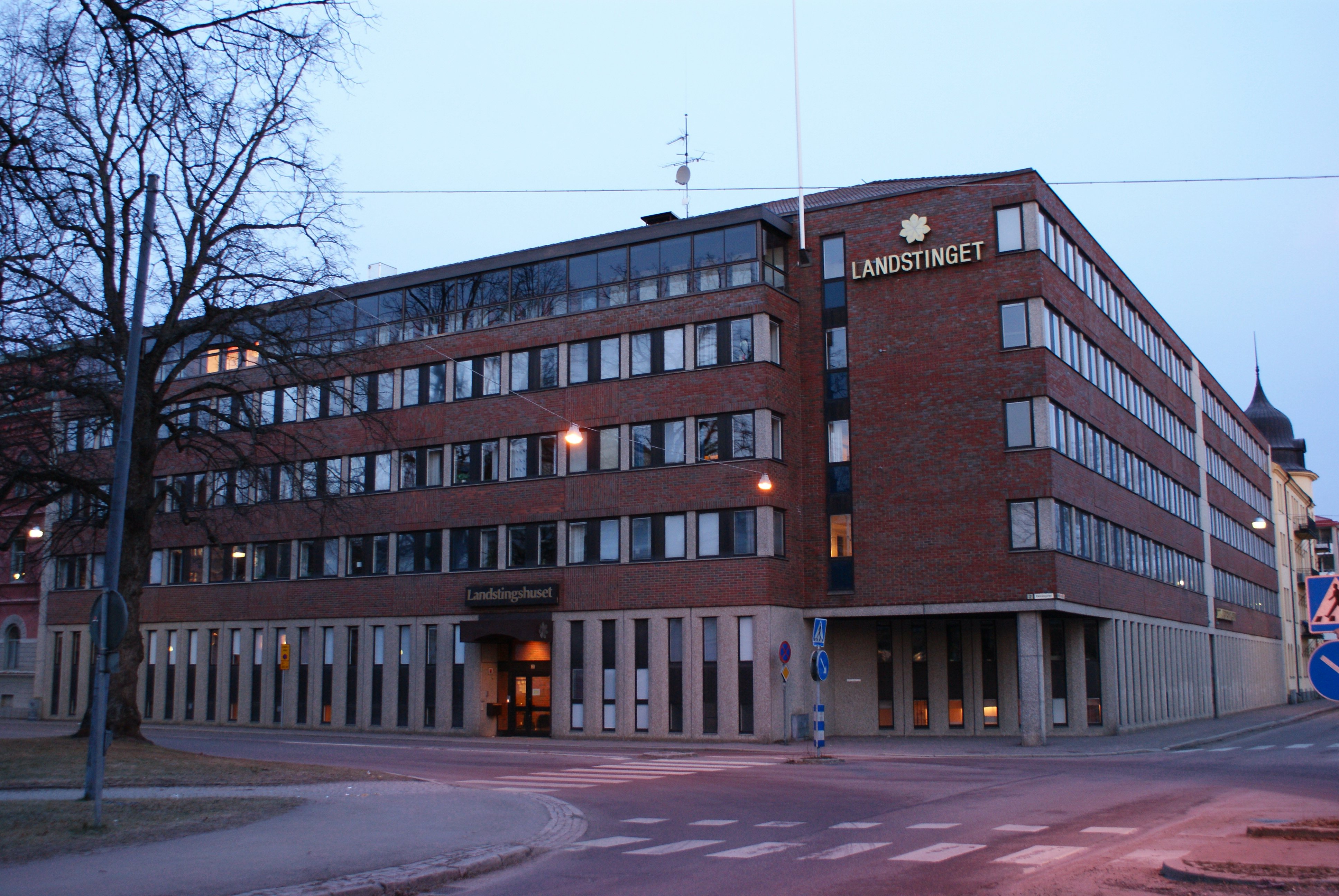 Landstingshuset i Karlstad för Värmlands läns landsting. Byggår 1973. Arkitektgruppen Ha/Ho/Li ((Lars-Erik Havstad, Gunnar Hollström och Göran Lindell)